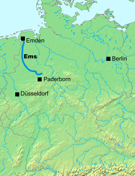 Verlauf der Ems, Bild: Frank van Anken, 29.08.2005, selber gemalt Anki64